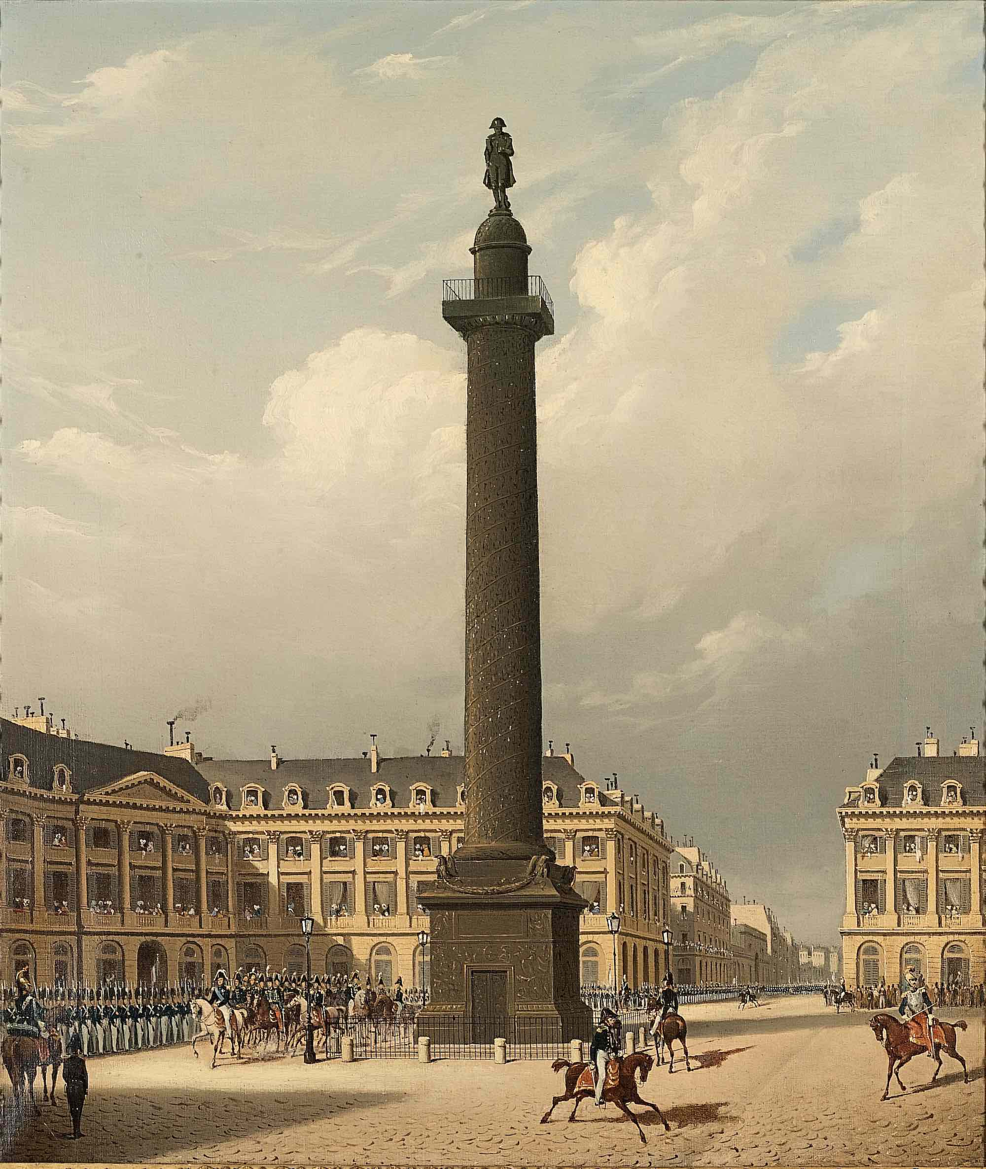 Huile sur toile - 75 x 64,5 cm Paris, Musée Carnavalet